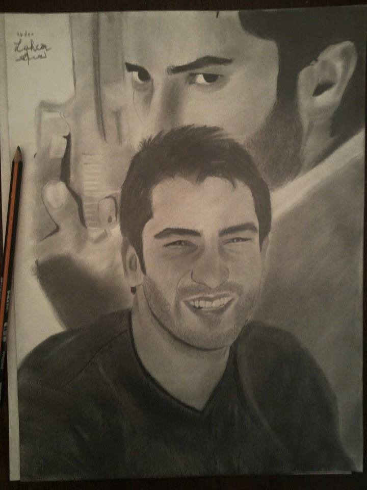 acteur truc mon dessin